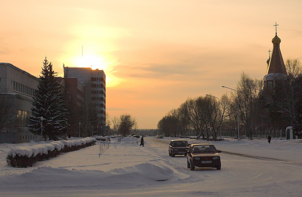 Seversk, Kurchatova str.